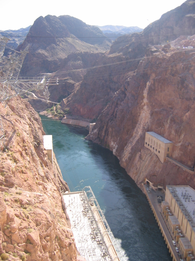 Hoover Dam, USA